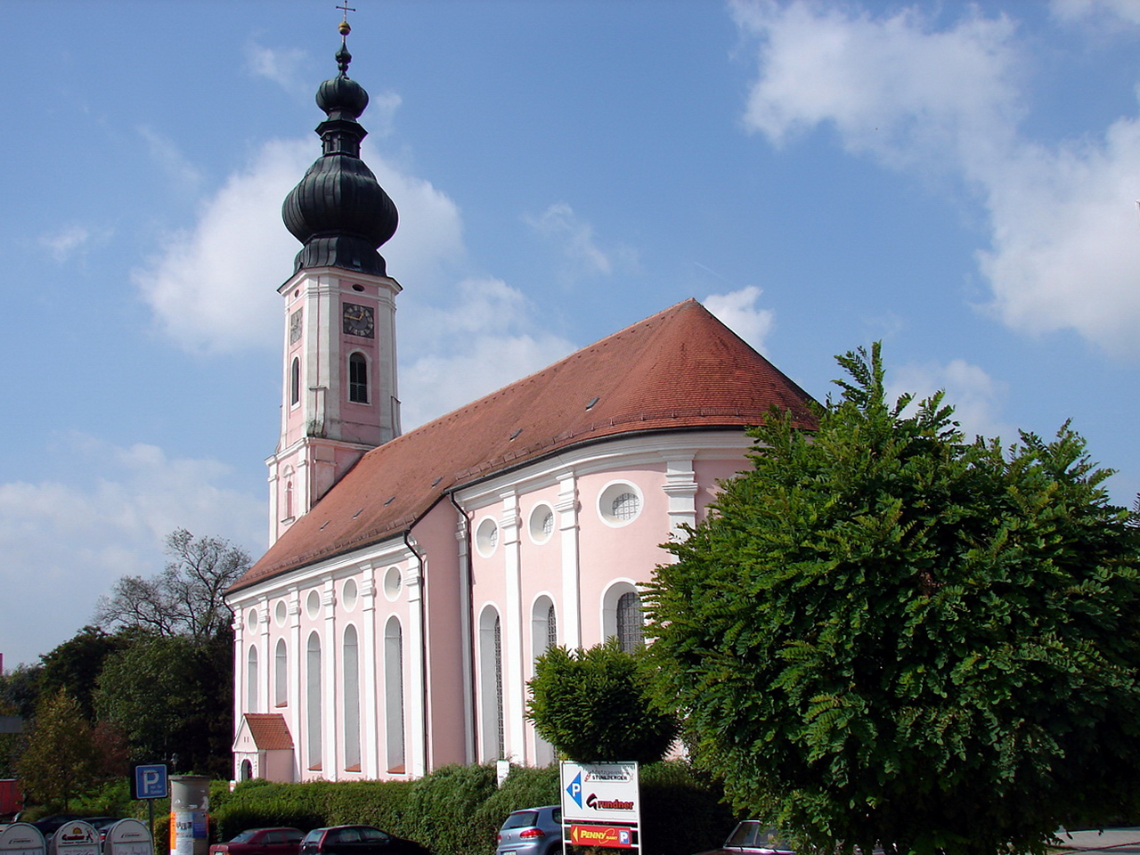 Die Kirche Mariä Geburt ist eine katholische Pfarrkirche im oberbayrischen Wartenberg.